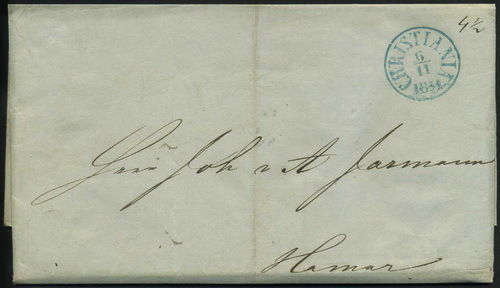 Почтовый конверт, отправленный из Христиании (Осло) в 1851 году